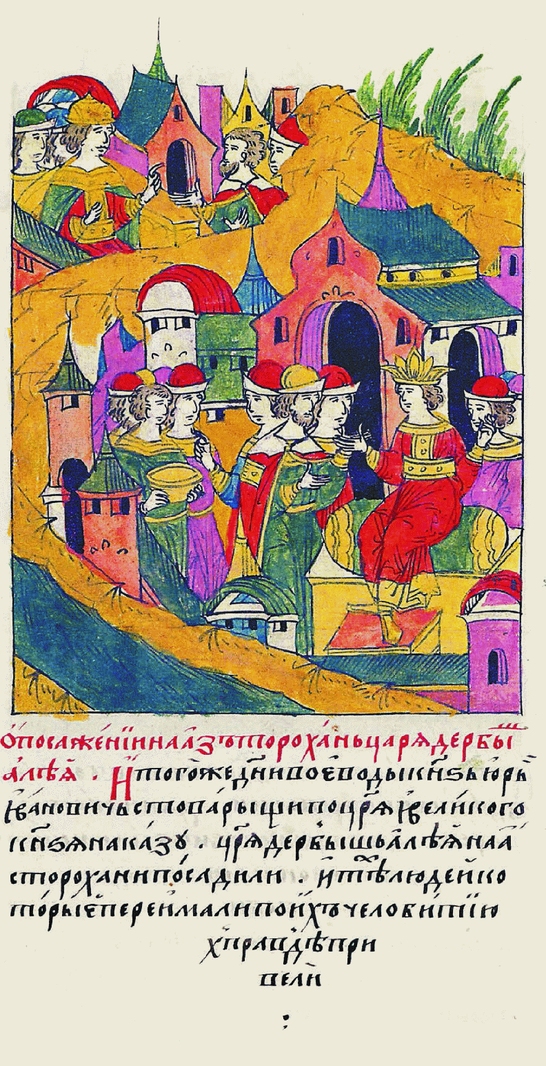 О посажении на Асторохань царя Дербыш Алея. И в тот же день воеводы князь Юрий Иванович с товарищами по наказу царя и великого князя на Асторохань посадили царя Дербыш-Алея, и тех людей, которых переловили, по их челобитью к клятве привели.